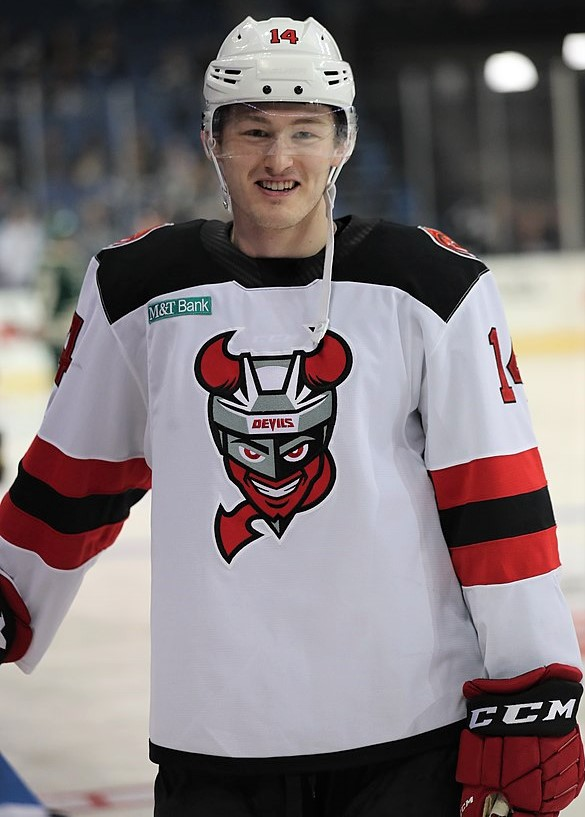 AA3I0312